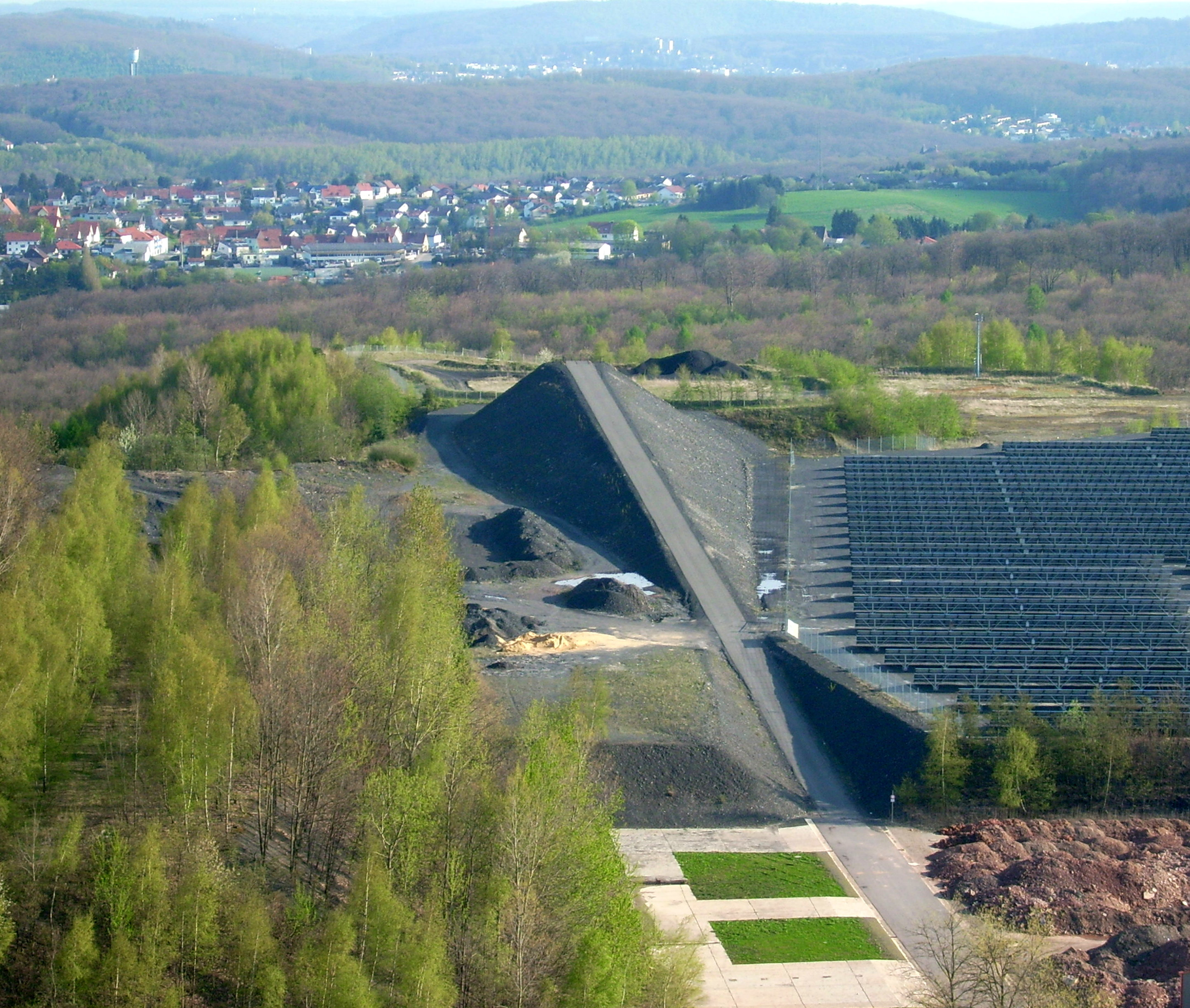 "Himmelspfeil" auf dem Bergwerk Göttelborn